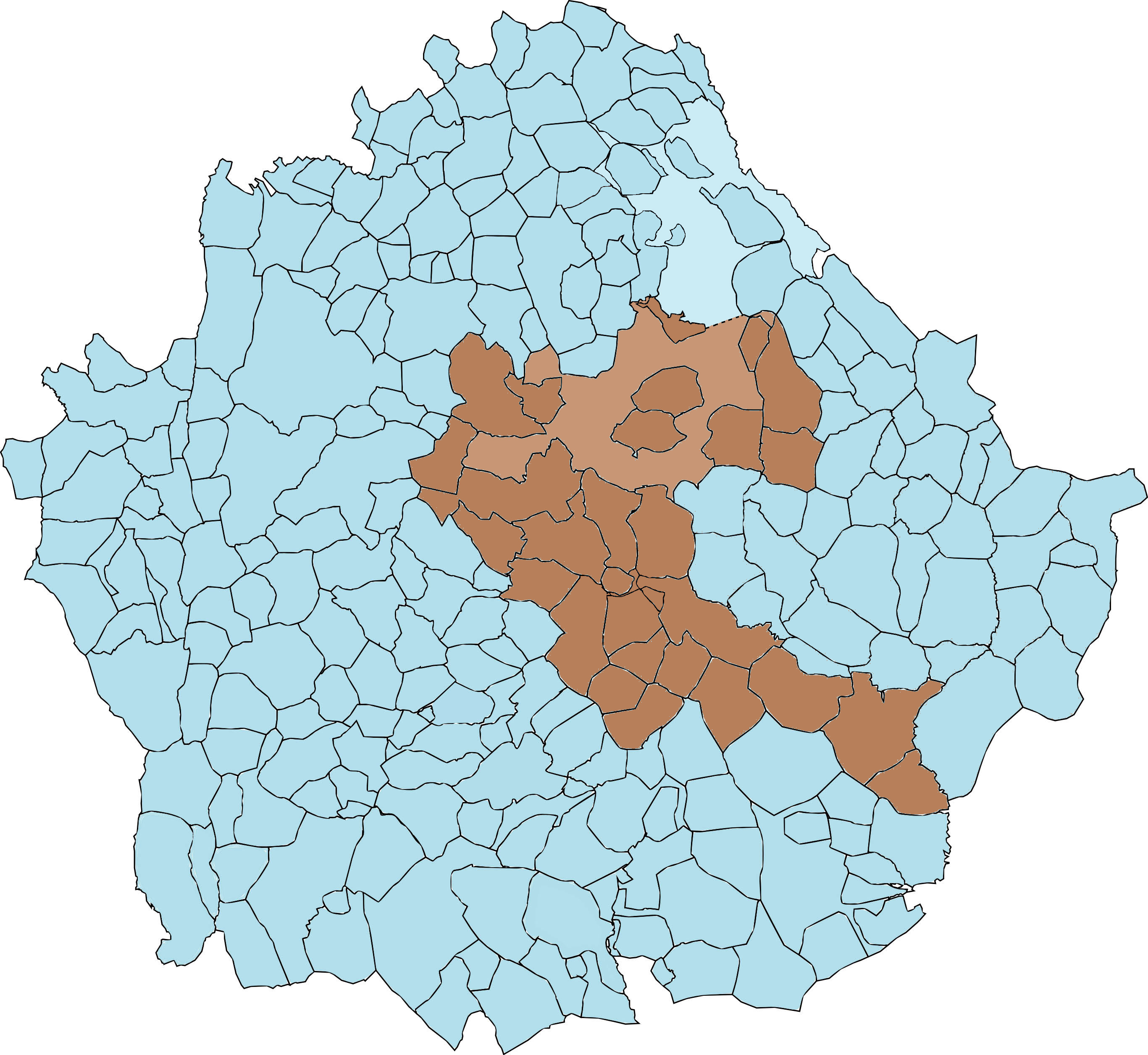 Comarca de la Serranía Media